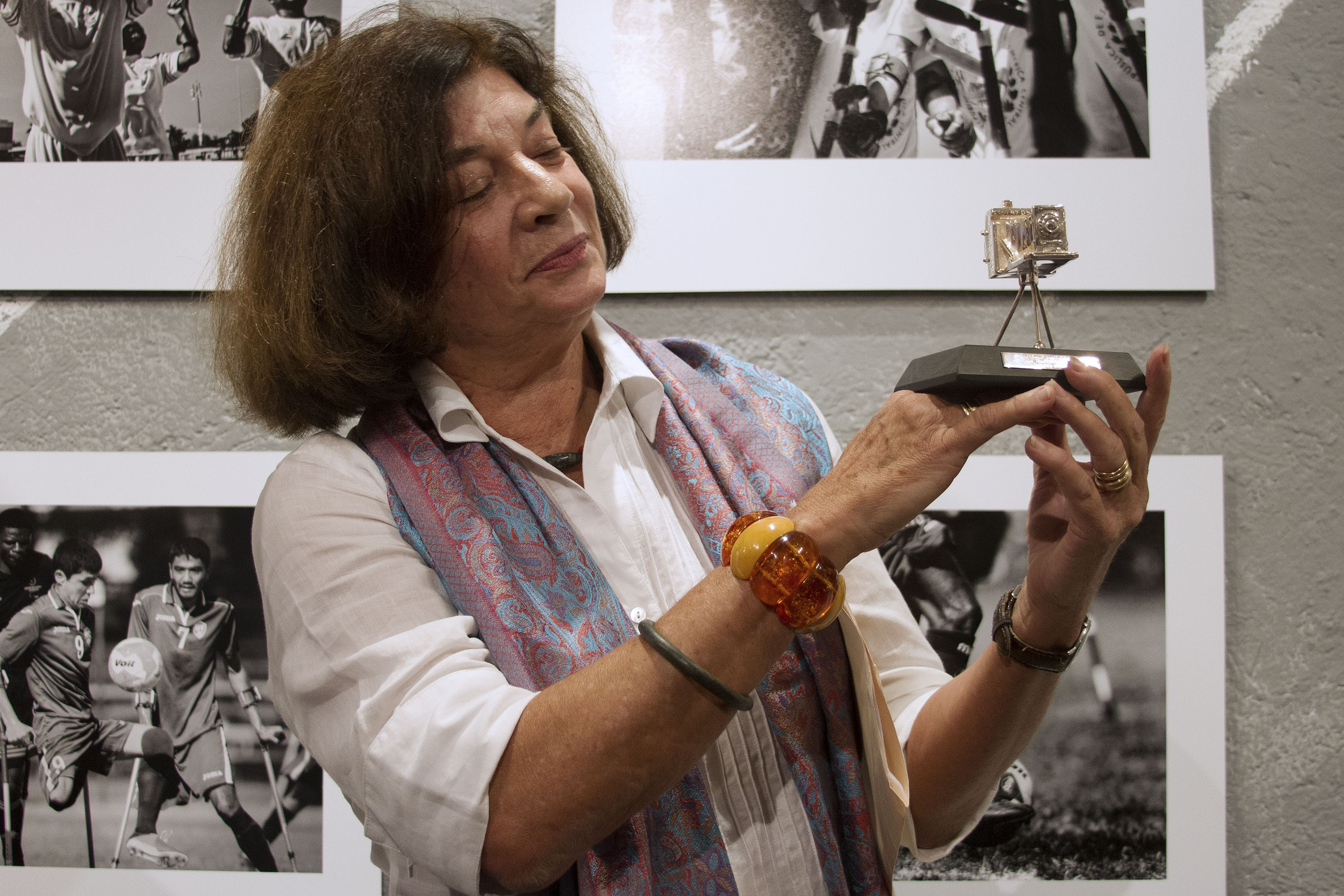 Viernes 19 de Junio 2015. En el Museo Archivo de la Fotografía se inauguró la exposición El deportista desconocido. Otros terrenos de juego, surgida del Concurso Nacional de Fotografía 2015, y además se entregó el Premio Cuartoscuro 2015, Cámara de Plata, a la maestra Christa Cowrie por su trayectoria. El acto fue encabezado por Vicente Guijosa Director del Museo Archivo de la Fotografía, Carmen Tostado Coordinadora de Patrimonio Histórico y Cultural de la Secretaría de Cultura y Pedro Valtierra Director de la Agencia Cuartoscuro. Foto: Tania Victoria / Secretaría de Cultura Ciudad de México.